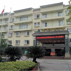 Chongqing Nanshan Lijing Hotel